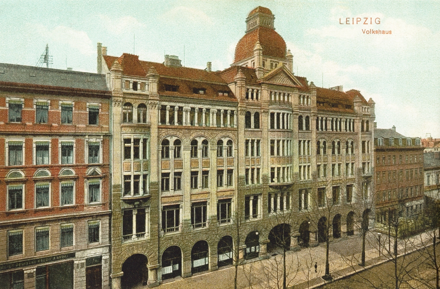 Der Erstbau des Volkshauses in Leipzig von 1906